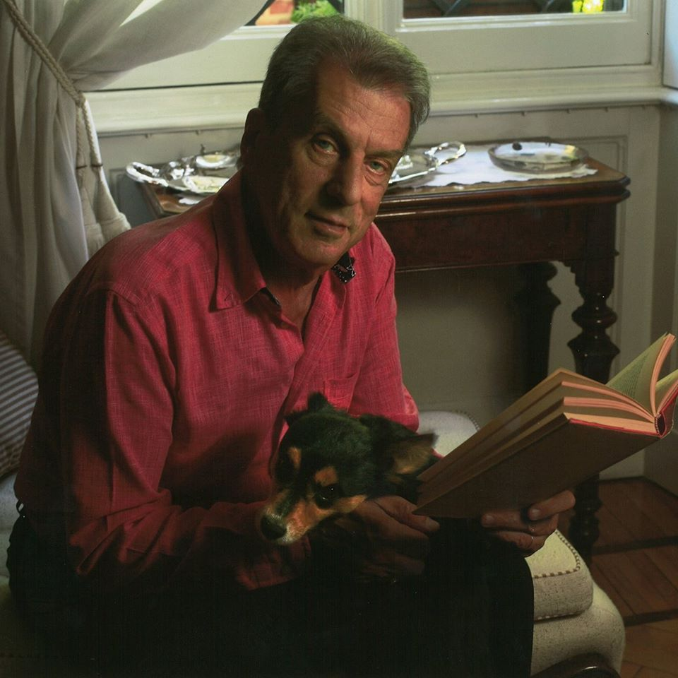 Alessandro Quasimodo con l'amato cagnolino Trenet